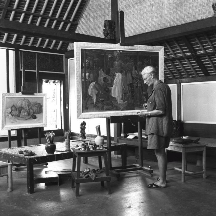 Negatif. Rudolf Bonnet sedang mengerjakan lukisan "Berpakaian Sebelum Tampil" di sanggarnya